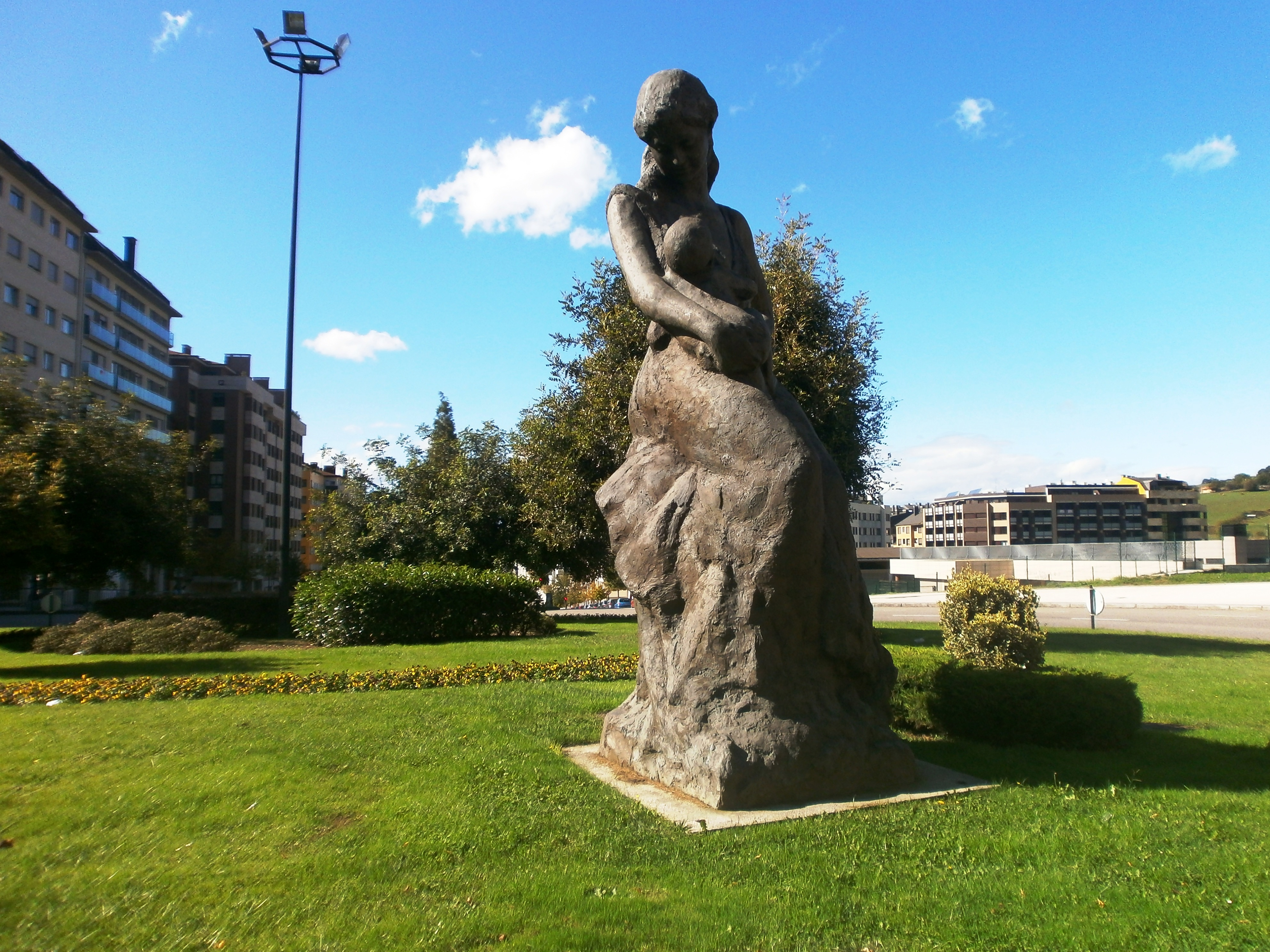 Esculturas en Oviedo al aire libre